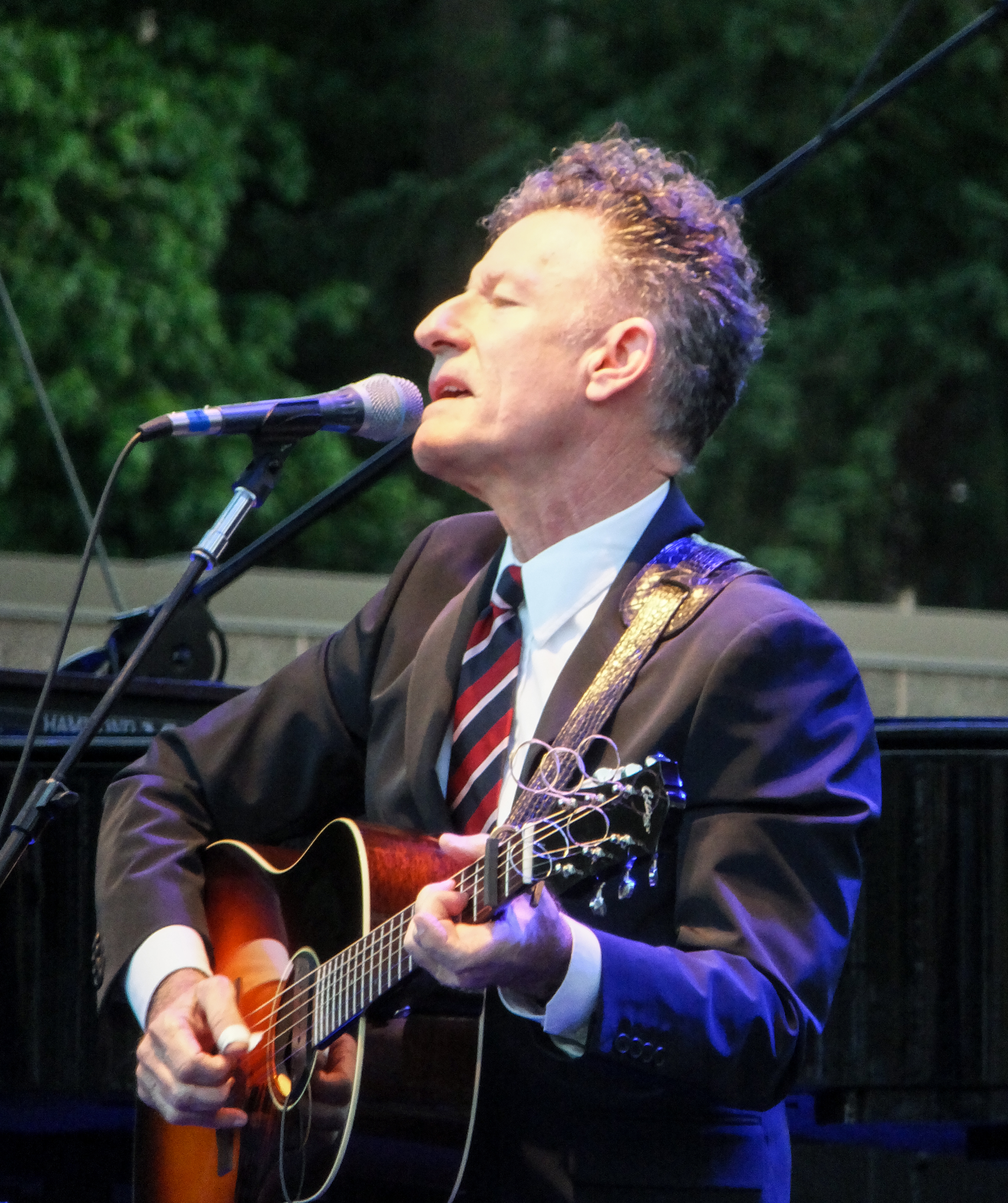 S0012410